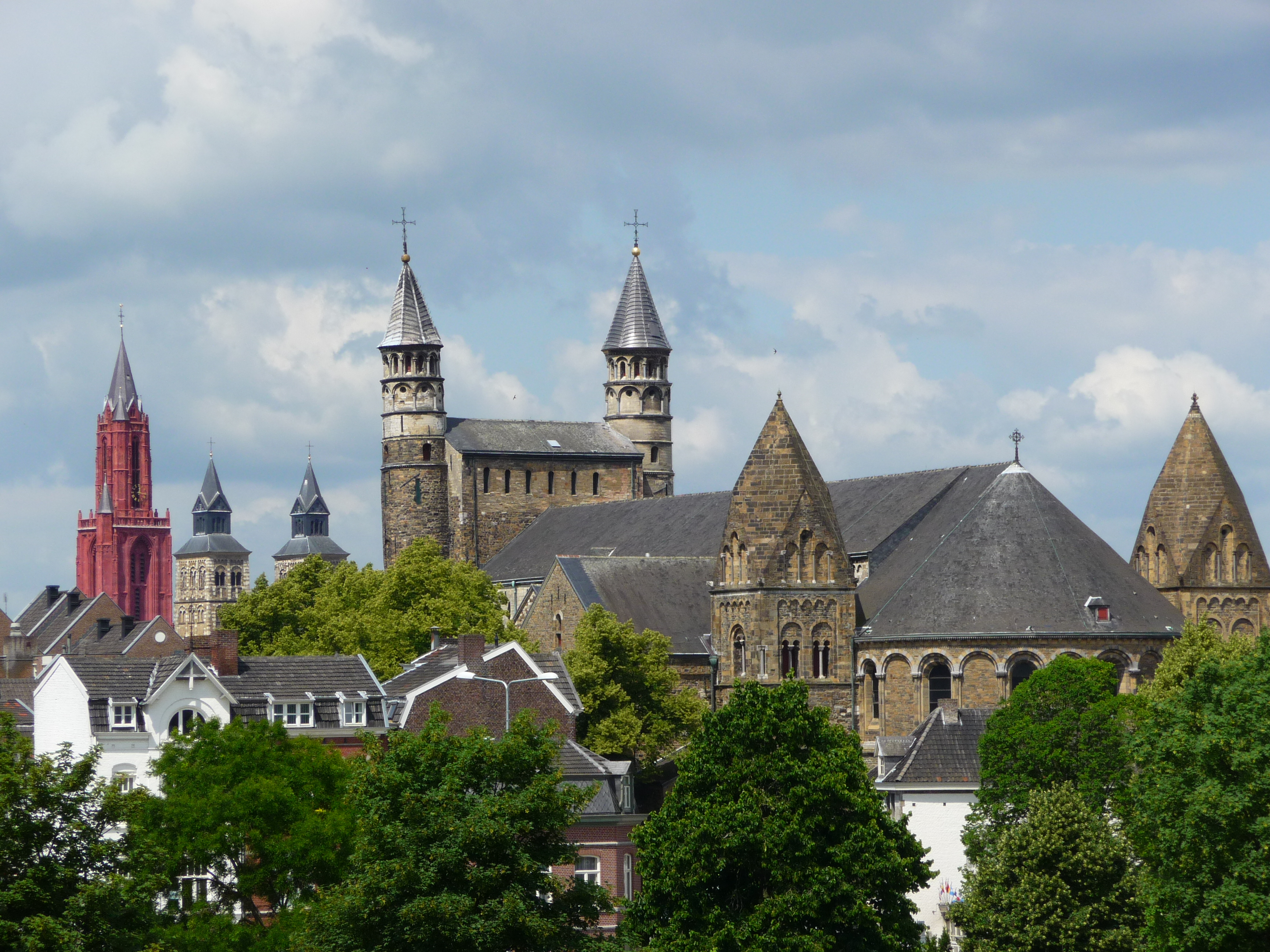 Zicht op Maastricht met vlnr de St Jan kerk, de St Servaas basiliek en de OLV Basiliek.